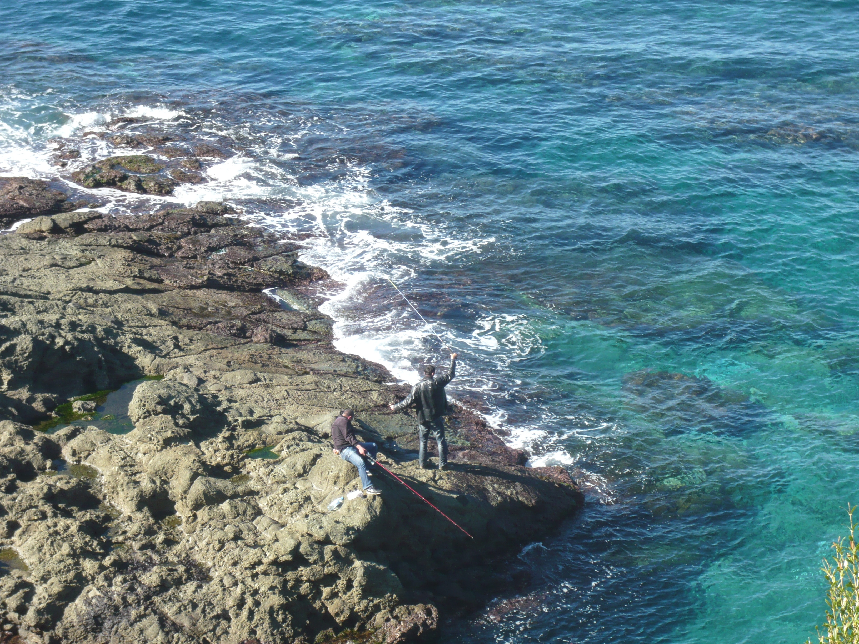 deux pécheurs de aouanna jijel Algérie en 2011 (c'est du mon propre travail et avec mon appareil photo)